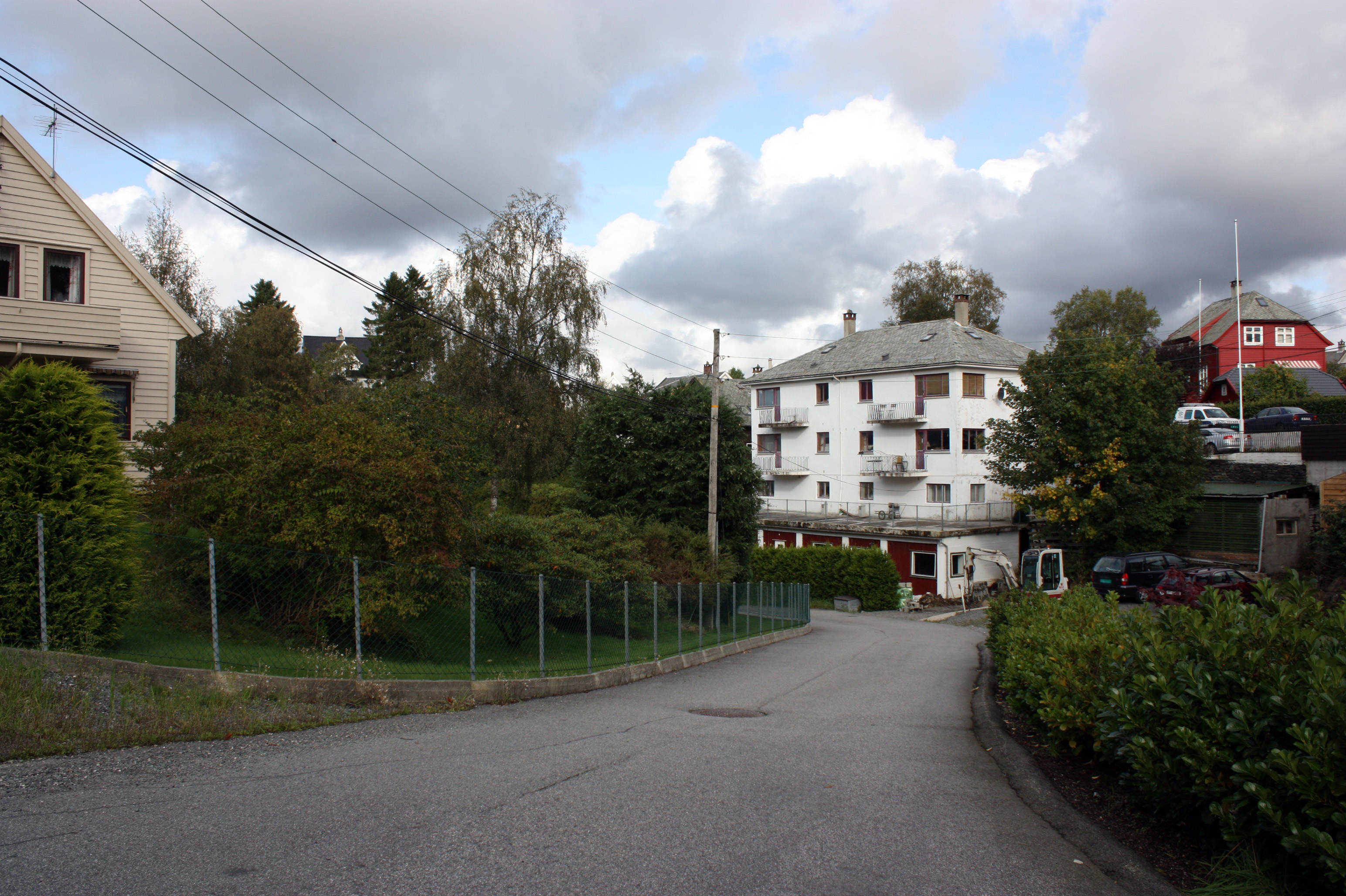 Brages veg, Fana, Bergen.